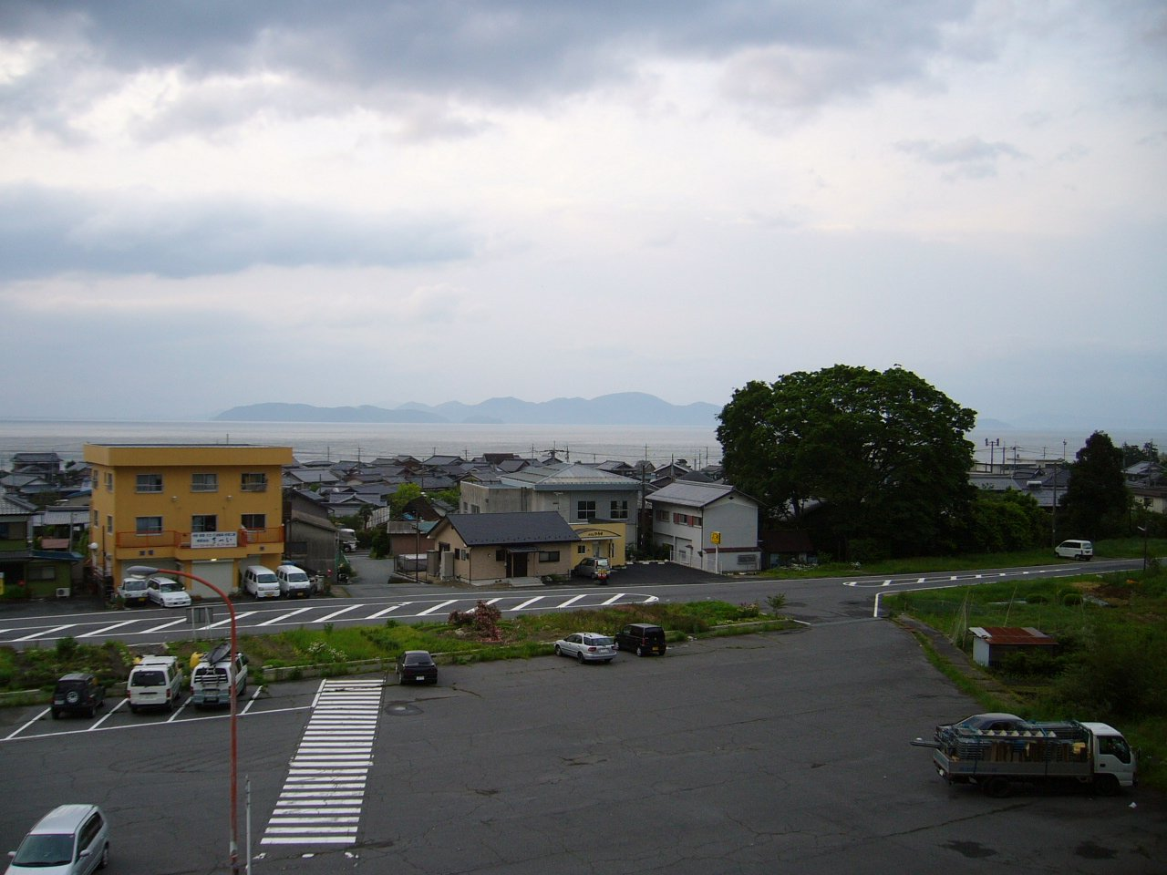 琵琶湖 湖西線北小松駅上りホームから 向こう岸手前の島はja:沖島